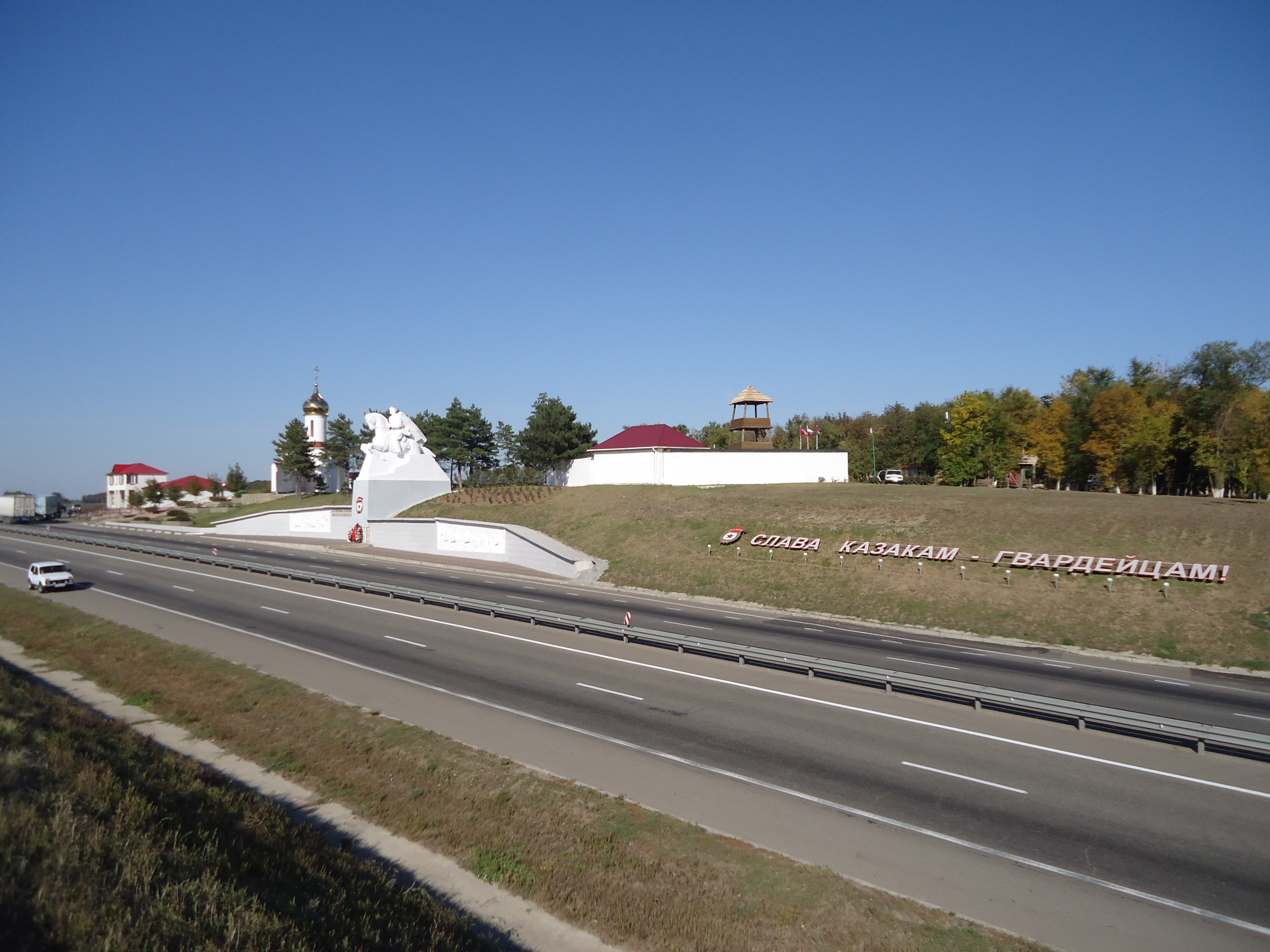 Памятник казакам 4-го гвардейского Кубанского кавалерийского казачьего корпуса. Федеральная дорога М-4. 2км севернее станицы Кущёвской. Кущёвский район, Краснодарский край